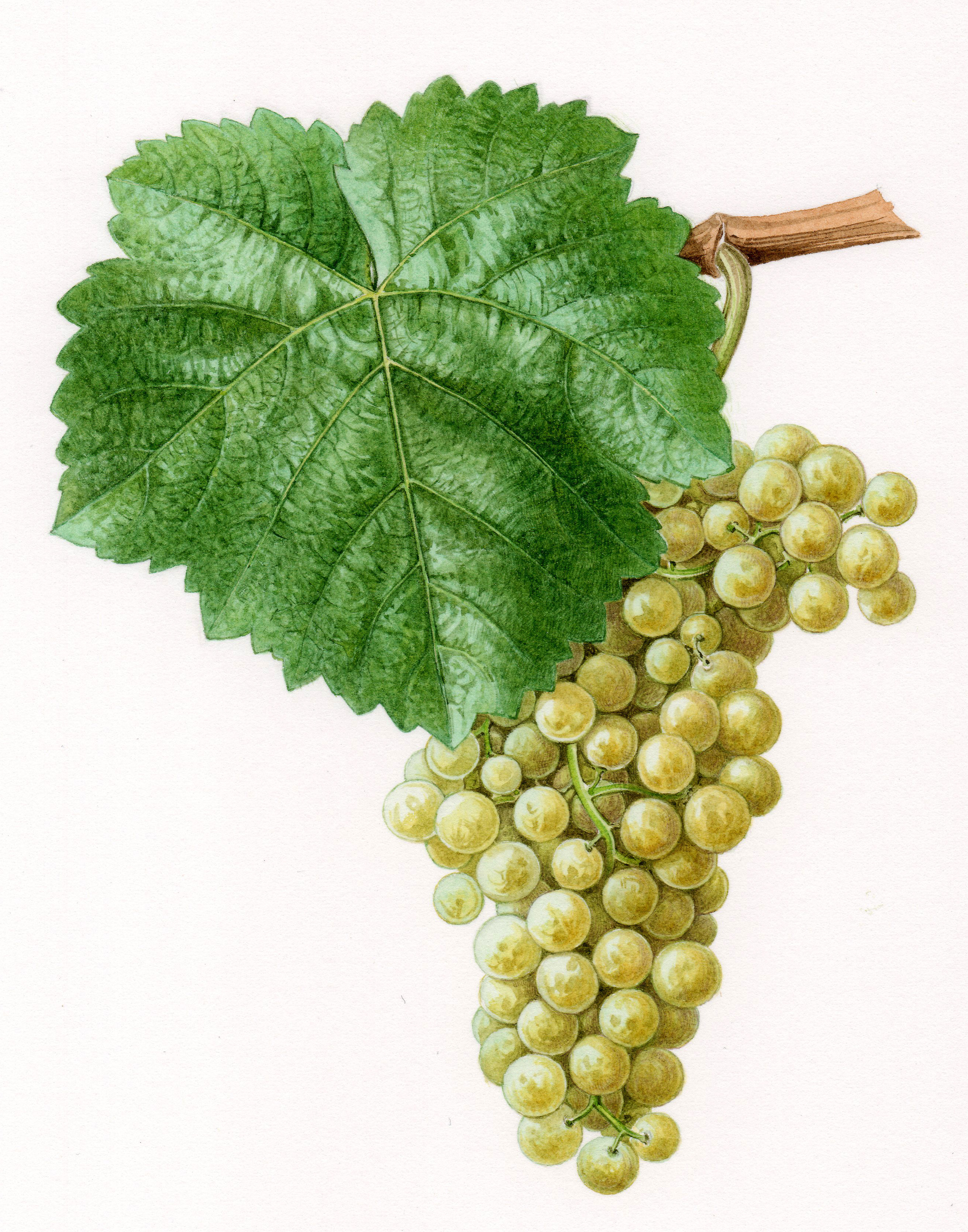 Aquarelle originale pour les Cépages de France (2001)